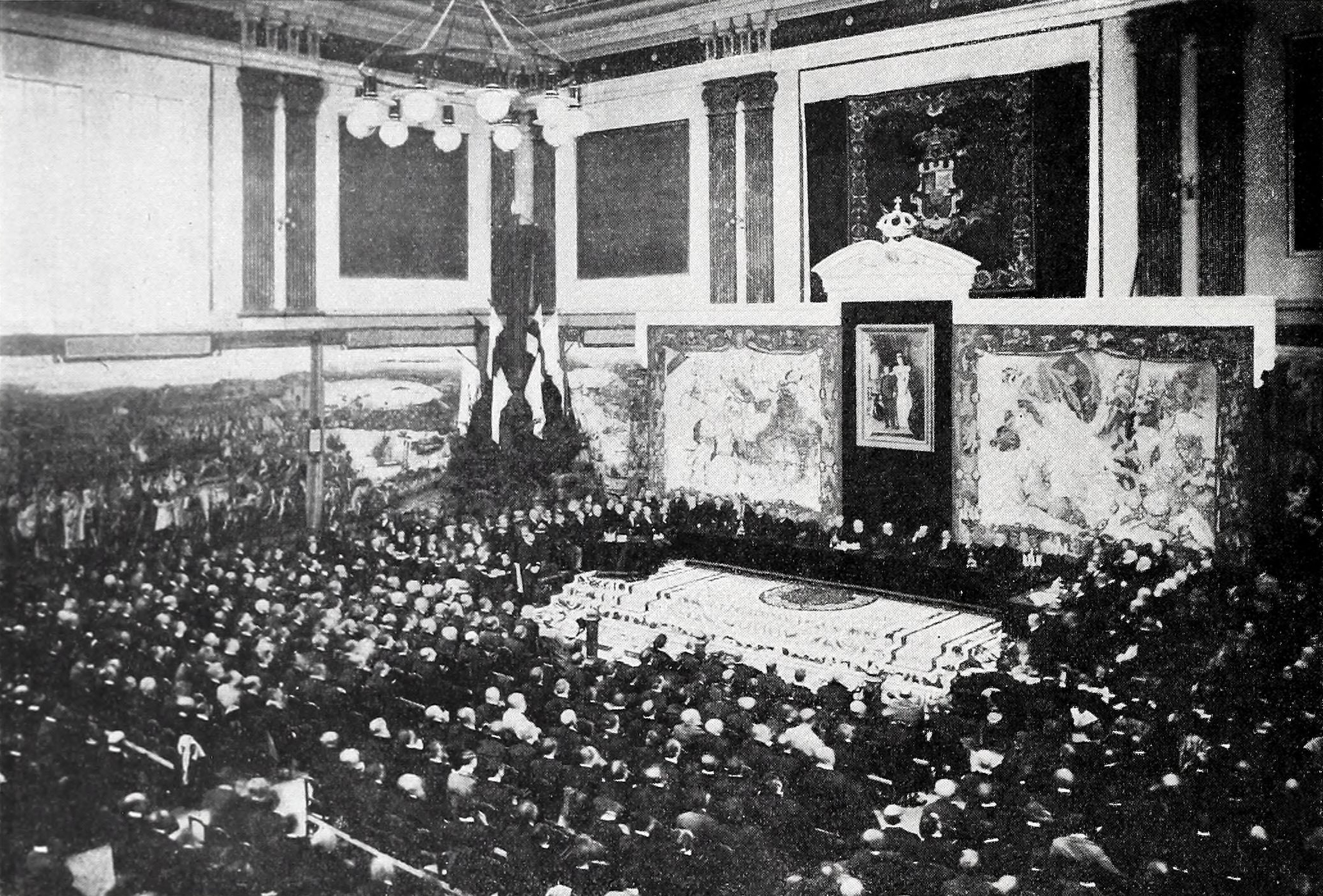 Congreso Iberoamericano, sesión inaugural del 10 de noviembre de 1900 en el Palacio de la Biblioteca y Museos Nacionales.